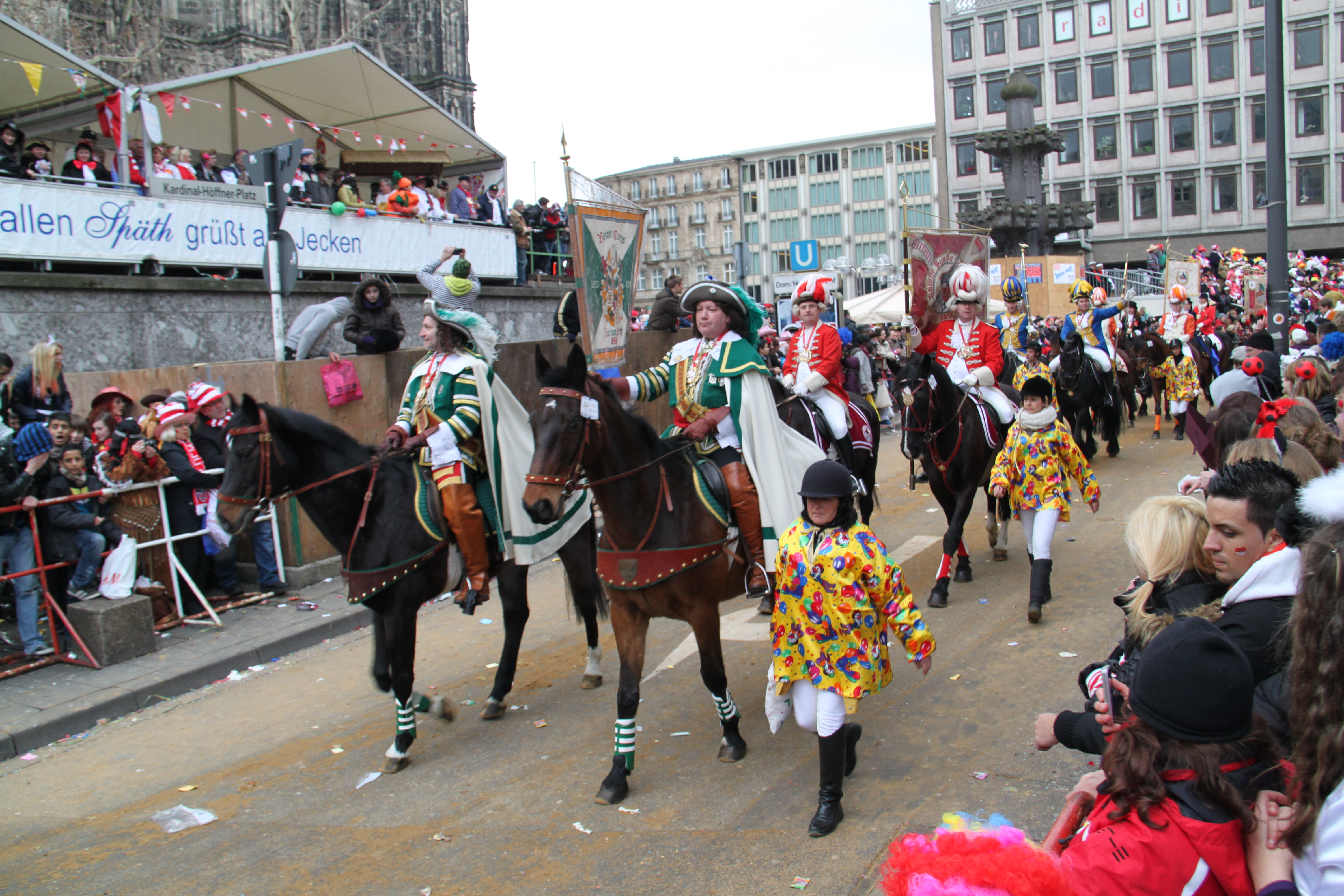 Rosenmontagszug Köln 2012